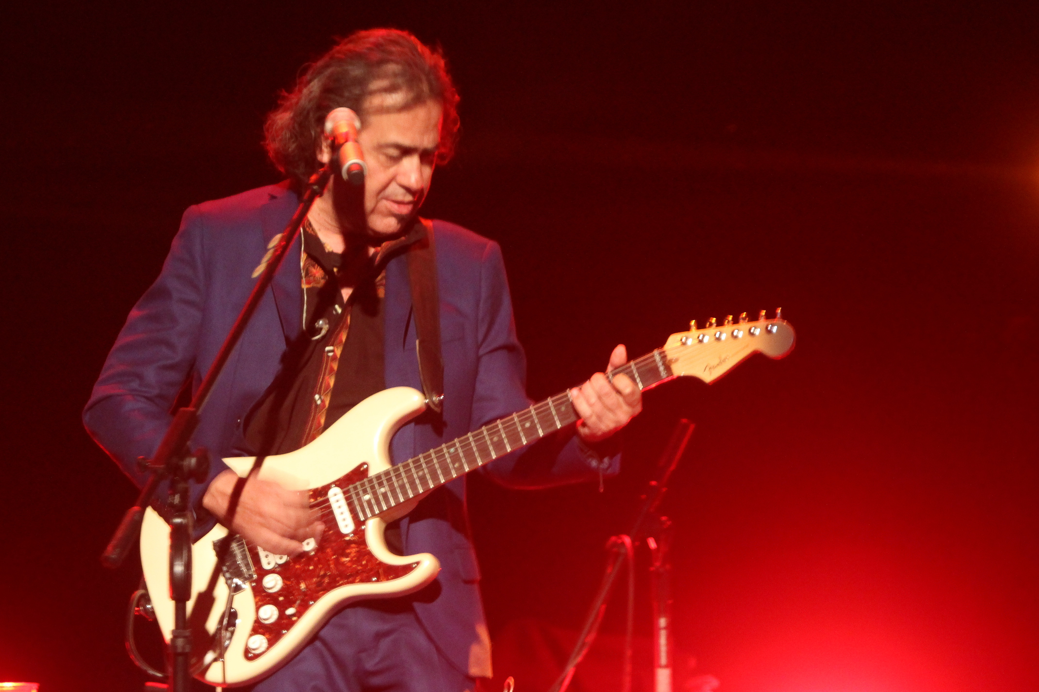 Viernes, 22 de Mayo del 2015. Celebra su 20 Aniversario en el Teatro de la Ciudad de México Esperanza Iris el grupo La Barranca, ofreció el concierto titulado El fuego de la memoria. Foto: José Luna / Secretaría de Cultura Ciudad de México.